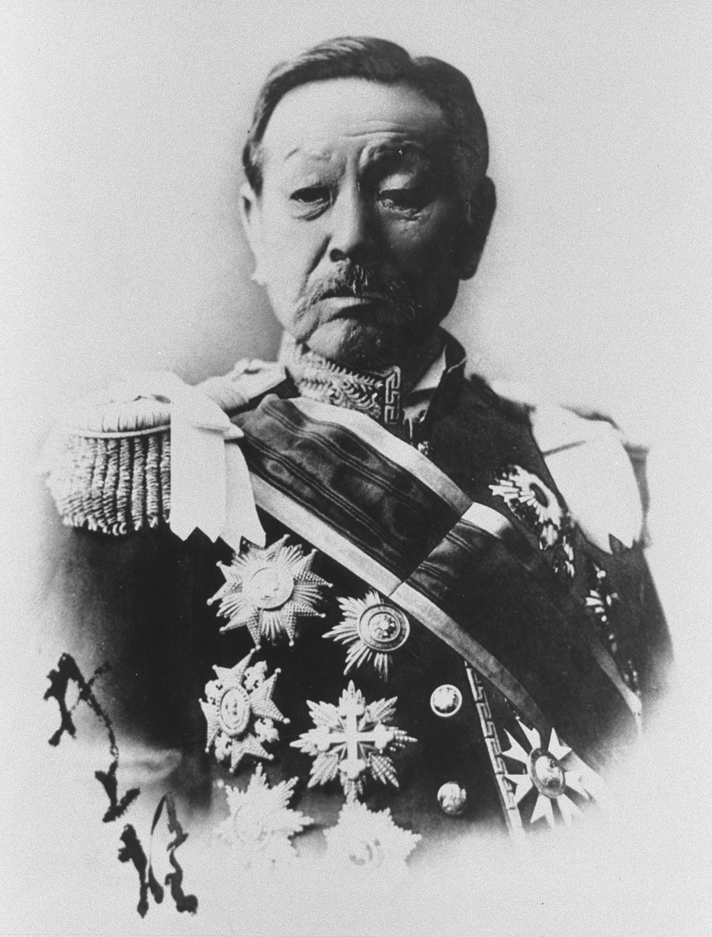 Portrait of Inoue Kaoru (井上馨, 1836 – 1915)